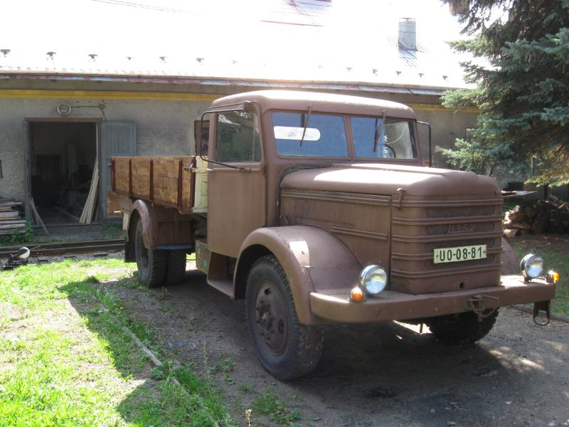 Nákladní automobil Czepel D 352